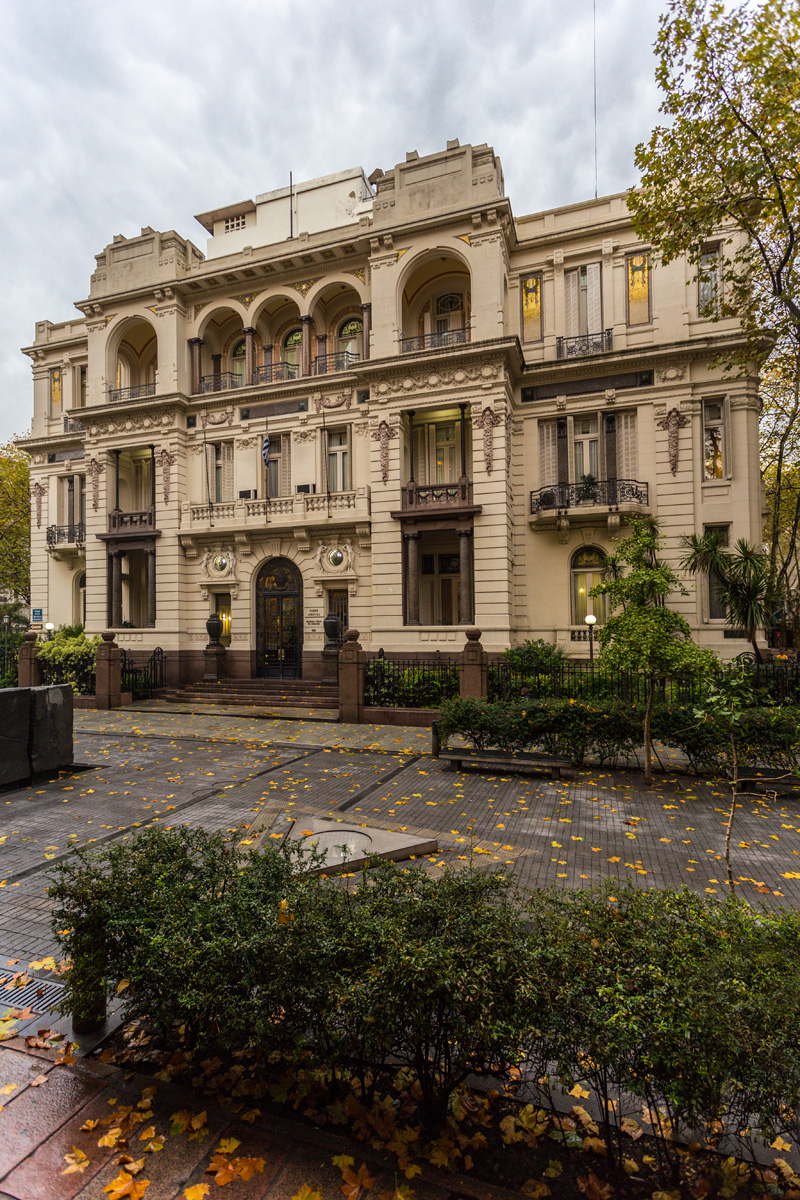 Palacio Piria - Sede de la Suprema Corte de Justicia. Ubicada en el departamento de Montevideo